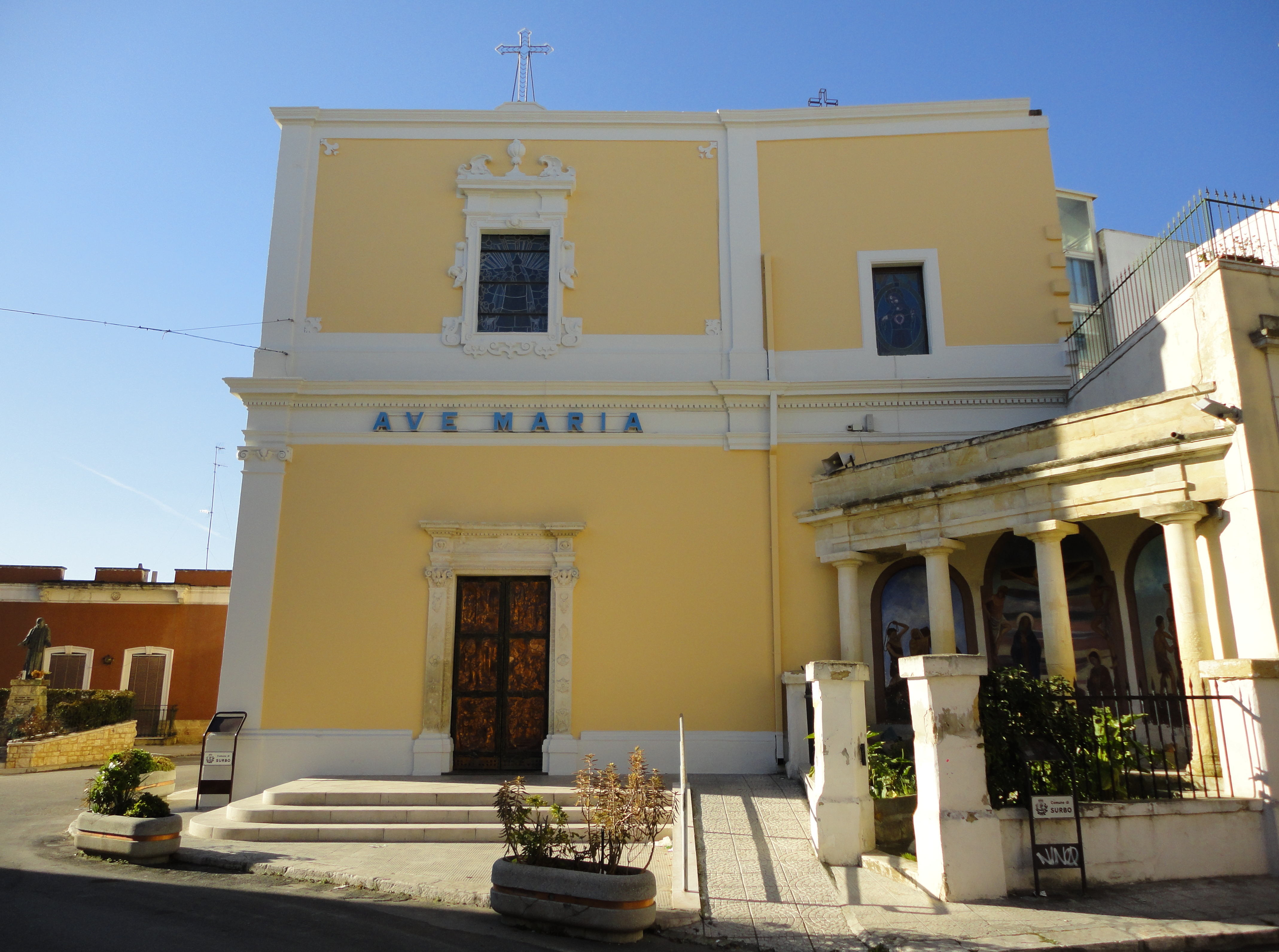 Chiesa Madonna di Loreto Surbo, Lecce